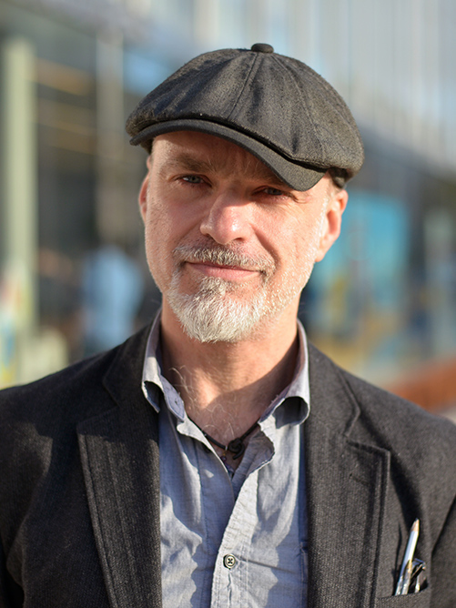 L'auteur de bande dessinée Christian De Metter en 2015.